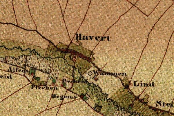 Preußische Kartenaufnahme 1846 - Uraufnahme